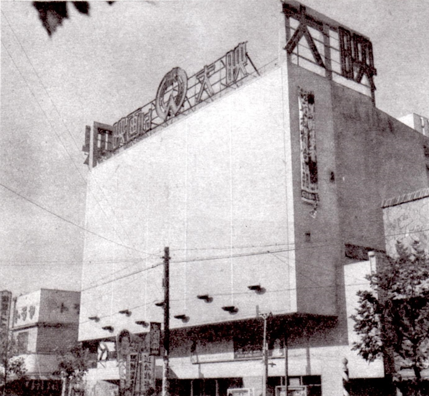 東京都渋谷区の映画館「渋谷大映」。